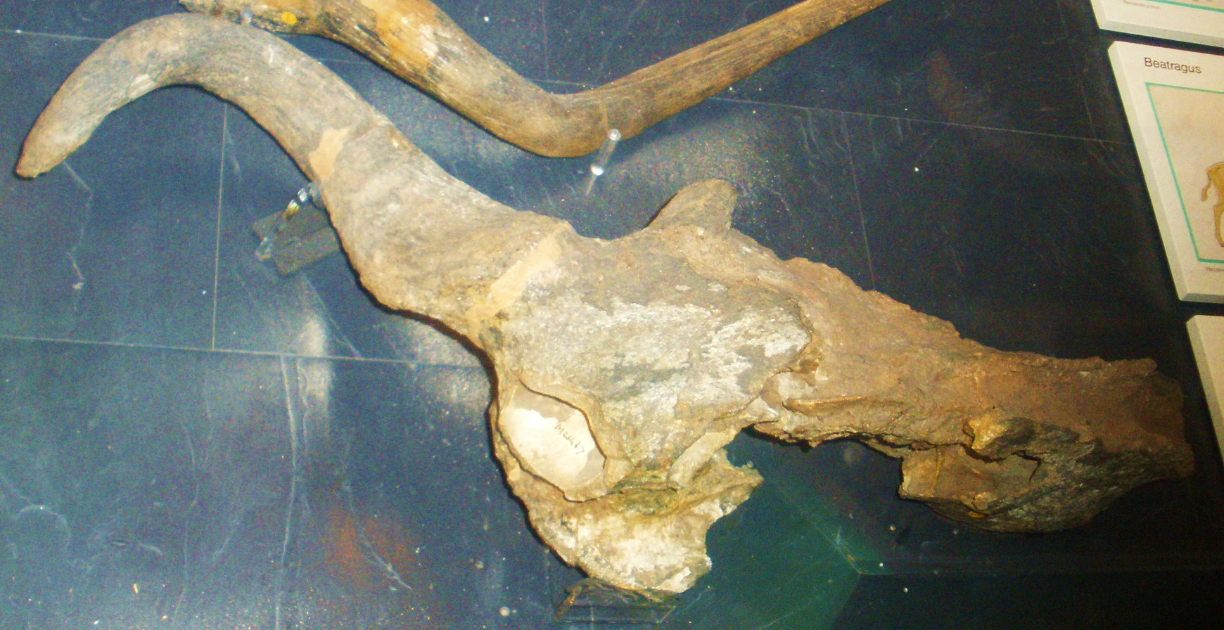 Fossil of Megalotragus, an extinct mammal -- Took the photo at Natural History Museum, London